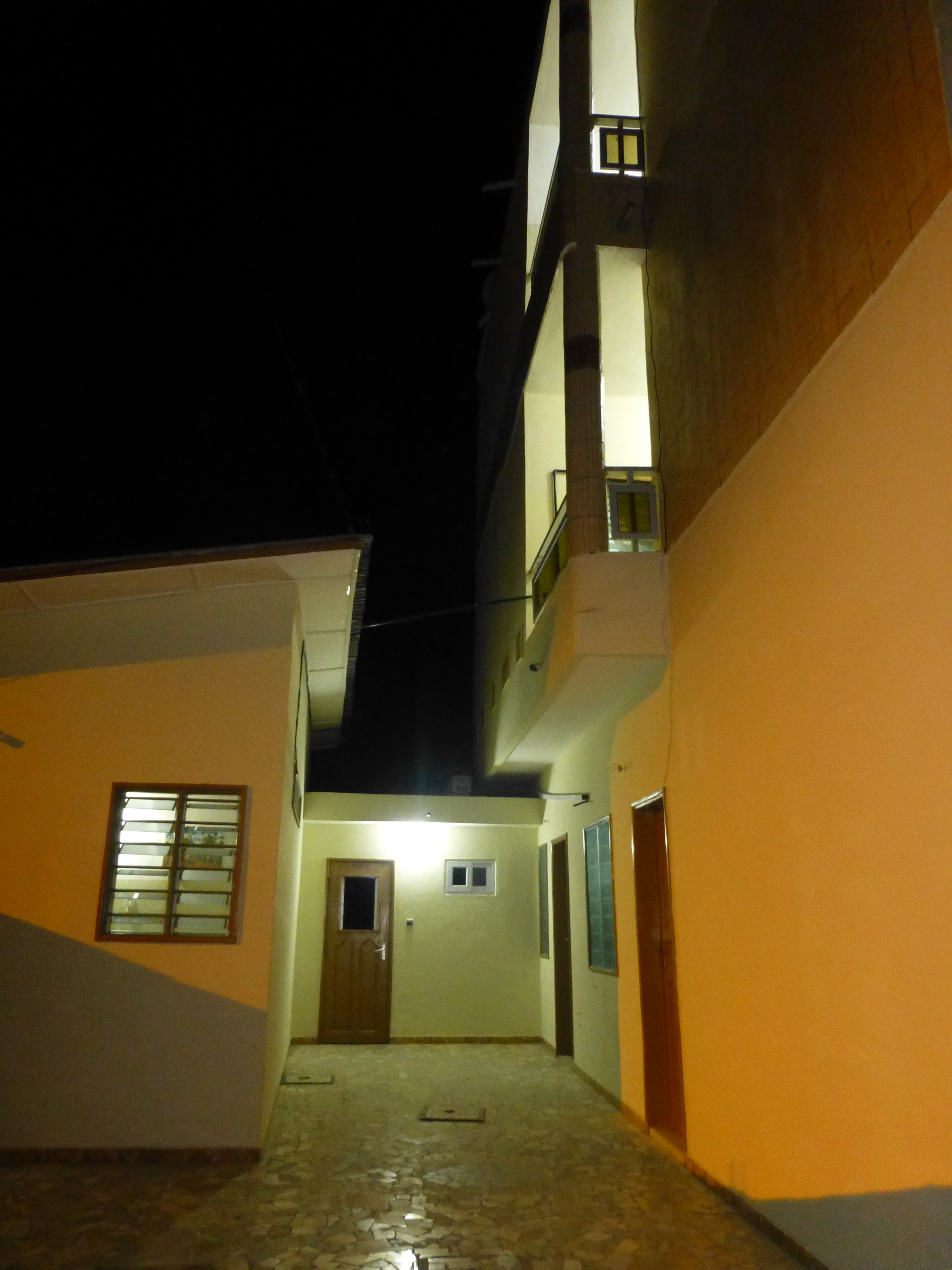 Hotelo JOCA nokte. Korto kaj fasado.